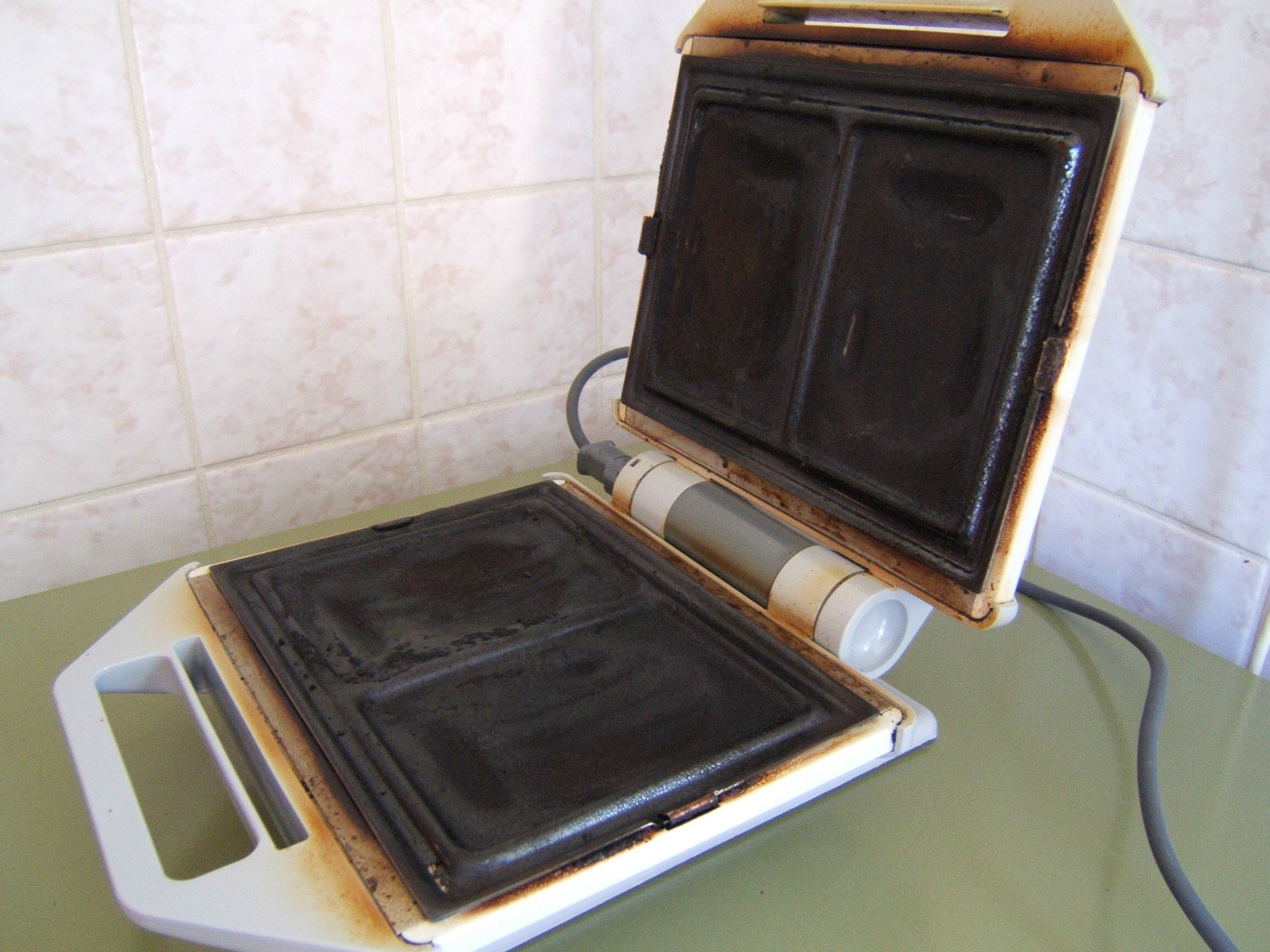 Een opengeklapt tosti-ijzer